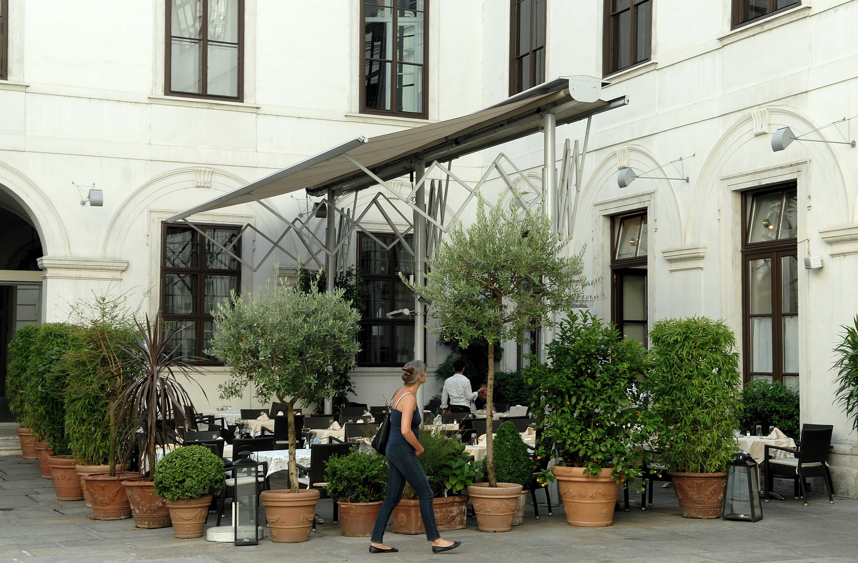 Trattoria Martinelli, Gastgarten, 2012